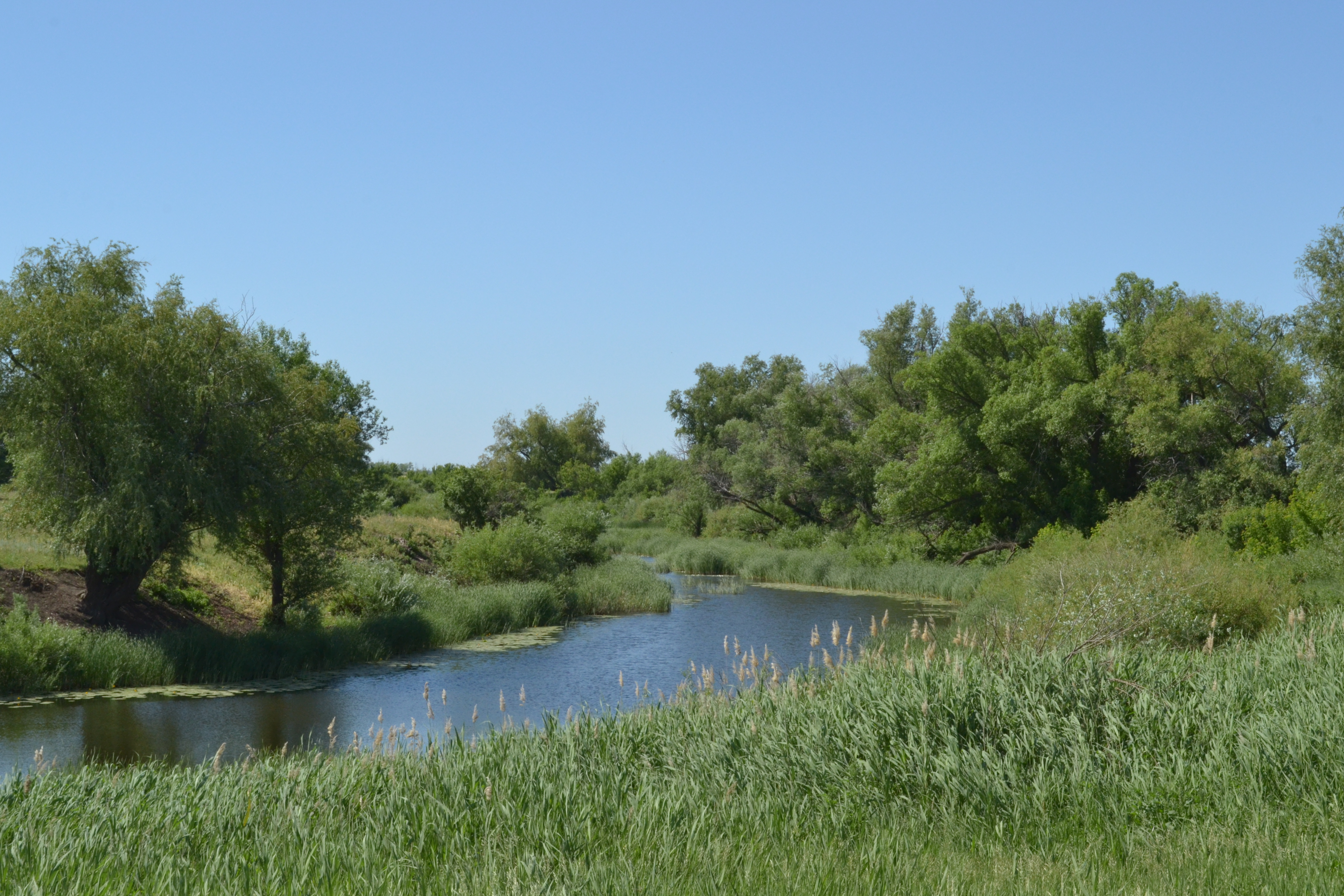 Изгиб реки Чаган